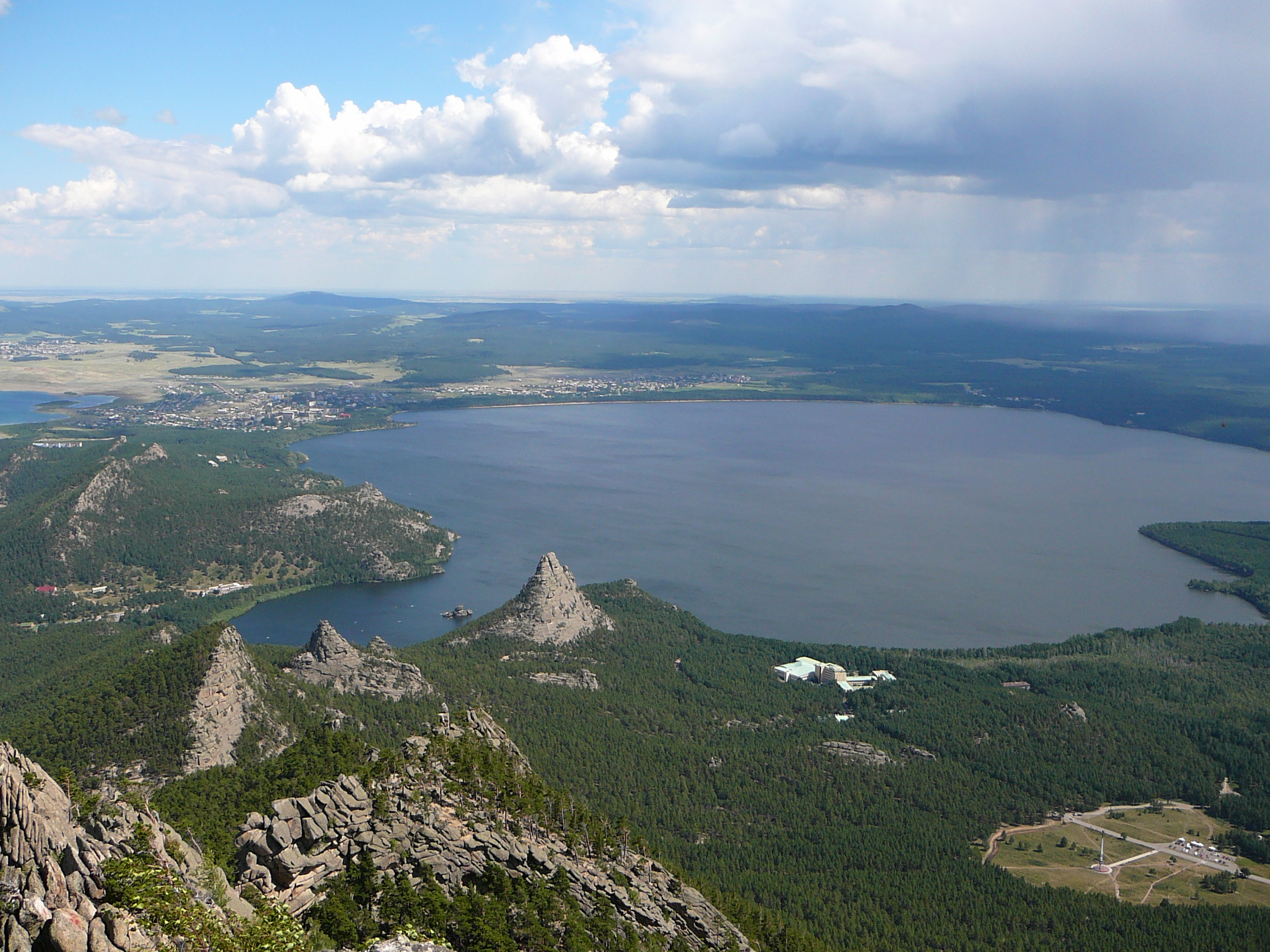 Вид с горы Кокшетау (второе название — гора Синюха — 947 метров над уровнем моря, от уровня озера — 620 метров) на Боровое озеро и посёлок Боровое. На переднем плане видна гора Окжетпес и правее неё санаторий "Окжетпес", расположенный в лесу. В правом нижнем углу снимка видна поляна Аблай-Хана. На левом краю снимка видна южная оконечность Большого Чебачьего озера.